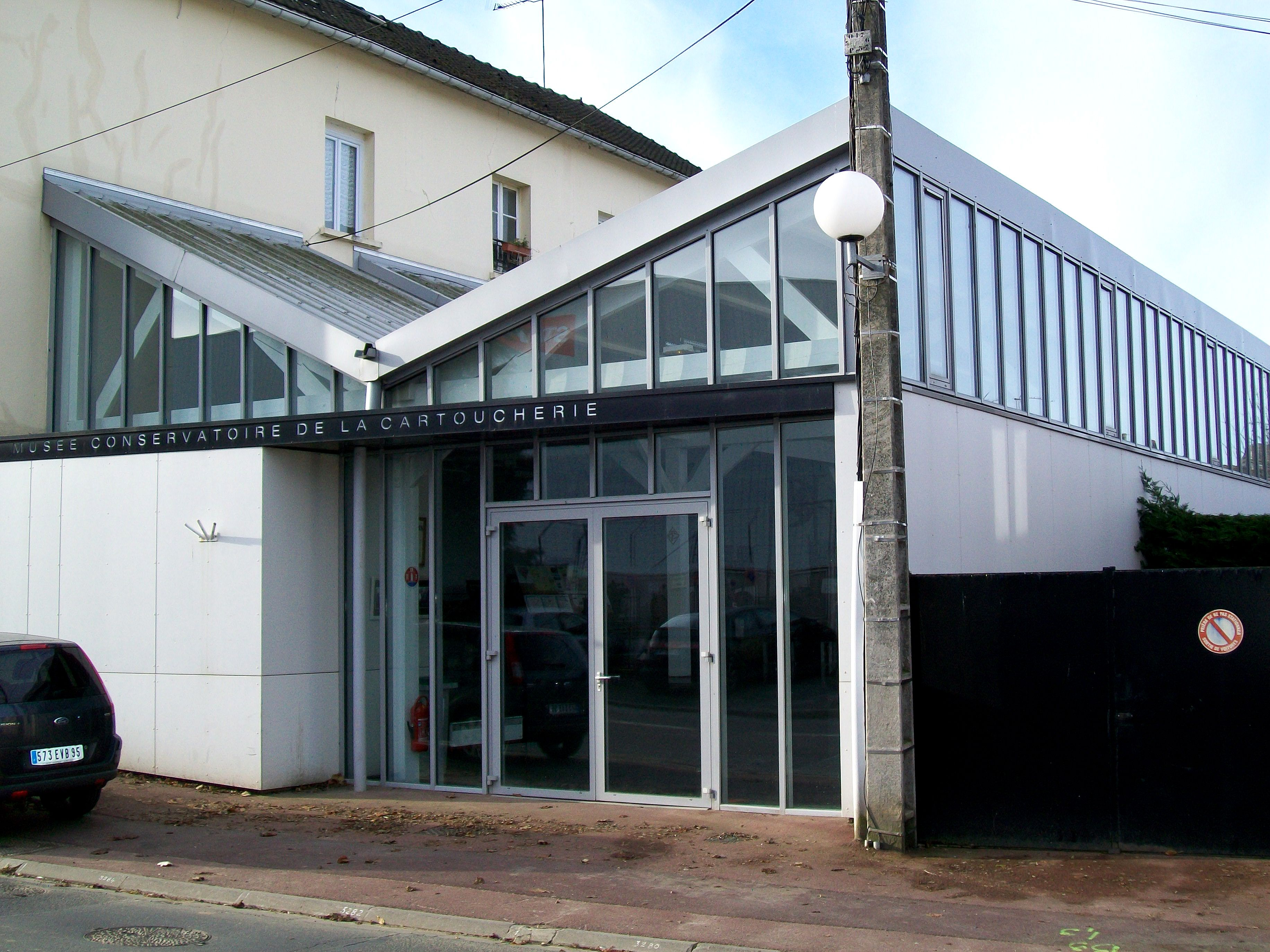 Musée Conservatoire de la Cartoucherie, entrée. Il s'agit de l'ancien gymnase de la cartoucherie.